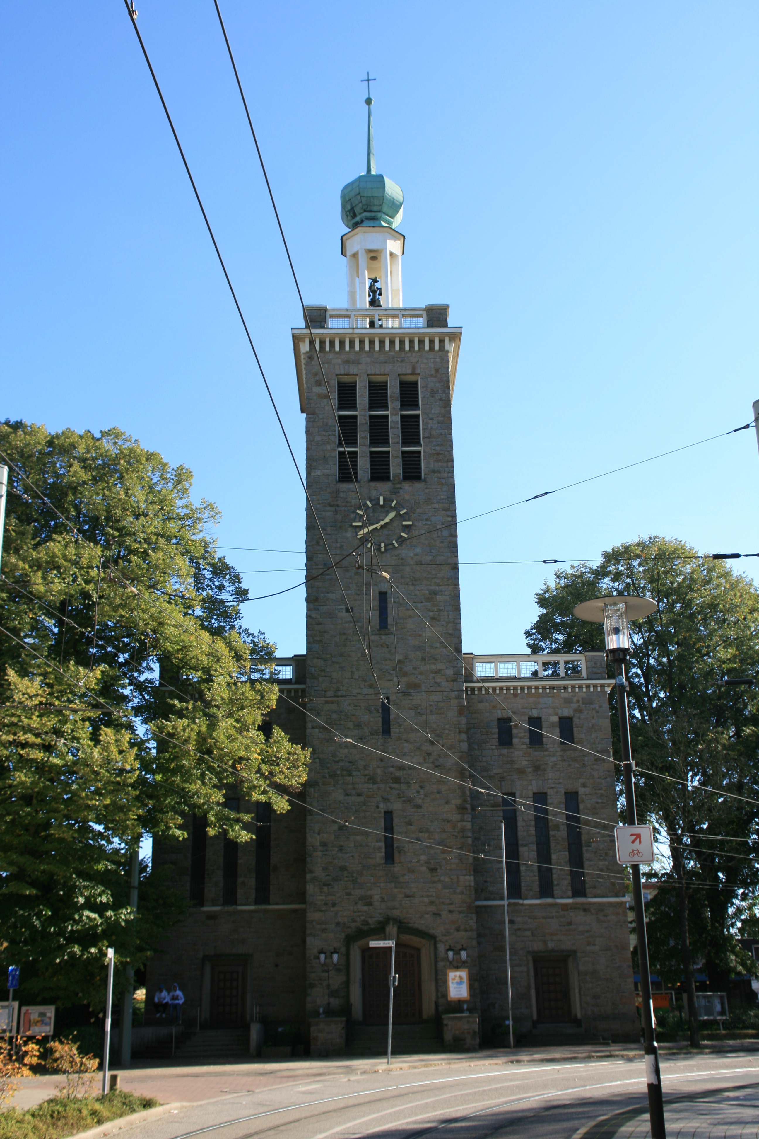 Evangelische Johanneskirche am Ende der Hauptstraße in Herne-Eickel